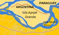 Mapa de las islas Apipé, República Argentina.